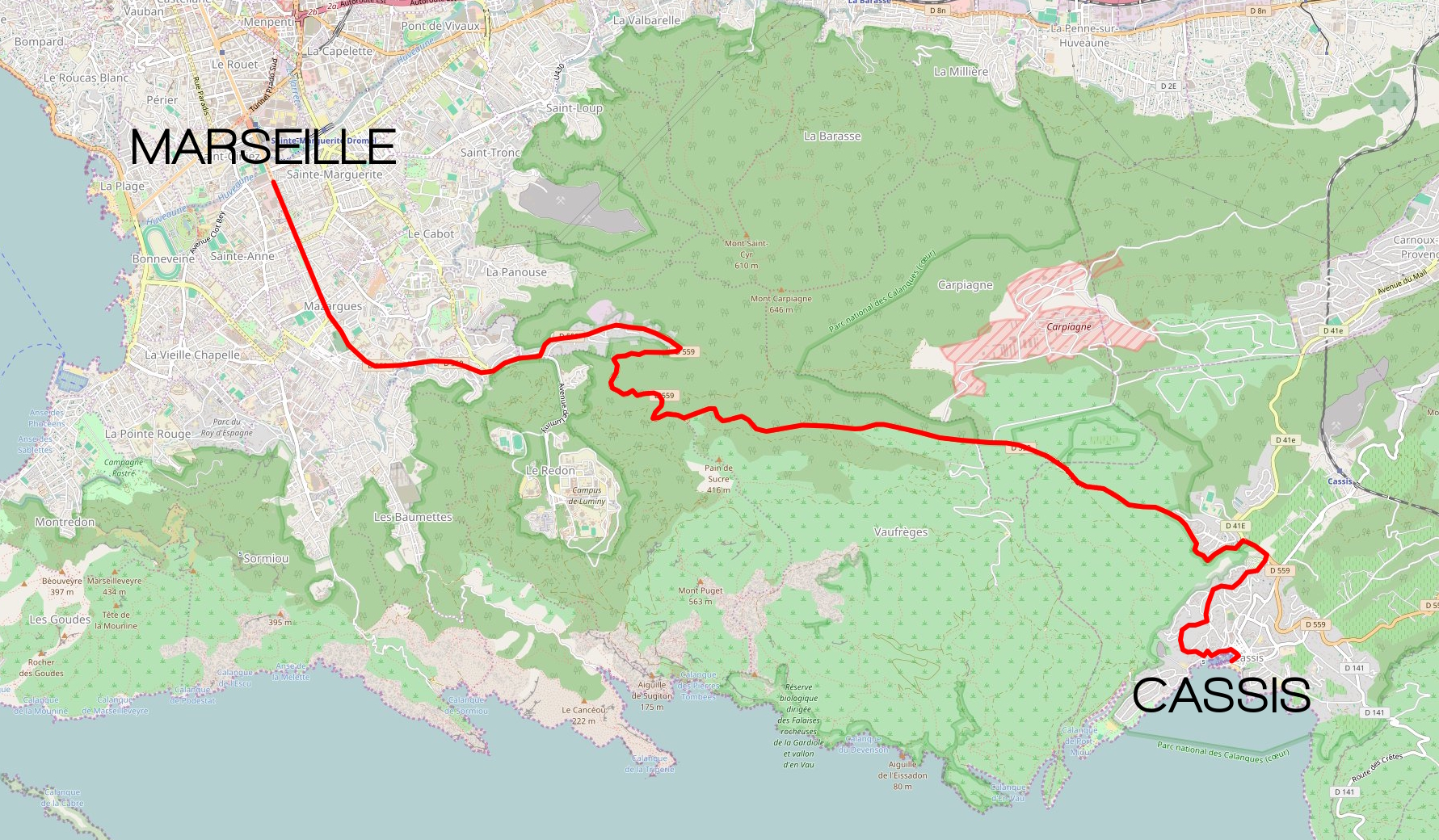 Parcours de la course pédestre Marseille-Cassis 2016